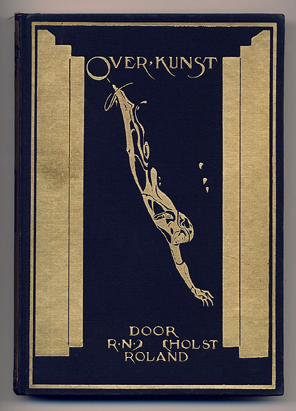 Boekomslag: Over kunst en kunstenaars, 1e druk 1923 auteur: R.N. Roland Holst bandontwerp: R.N. Roland Holst uitgeverij: J.M. Meulenhoff